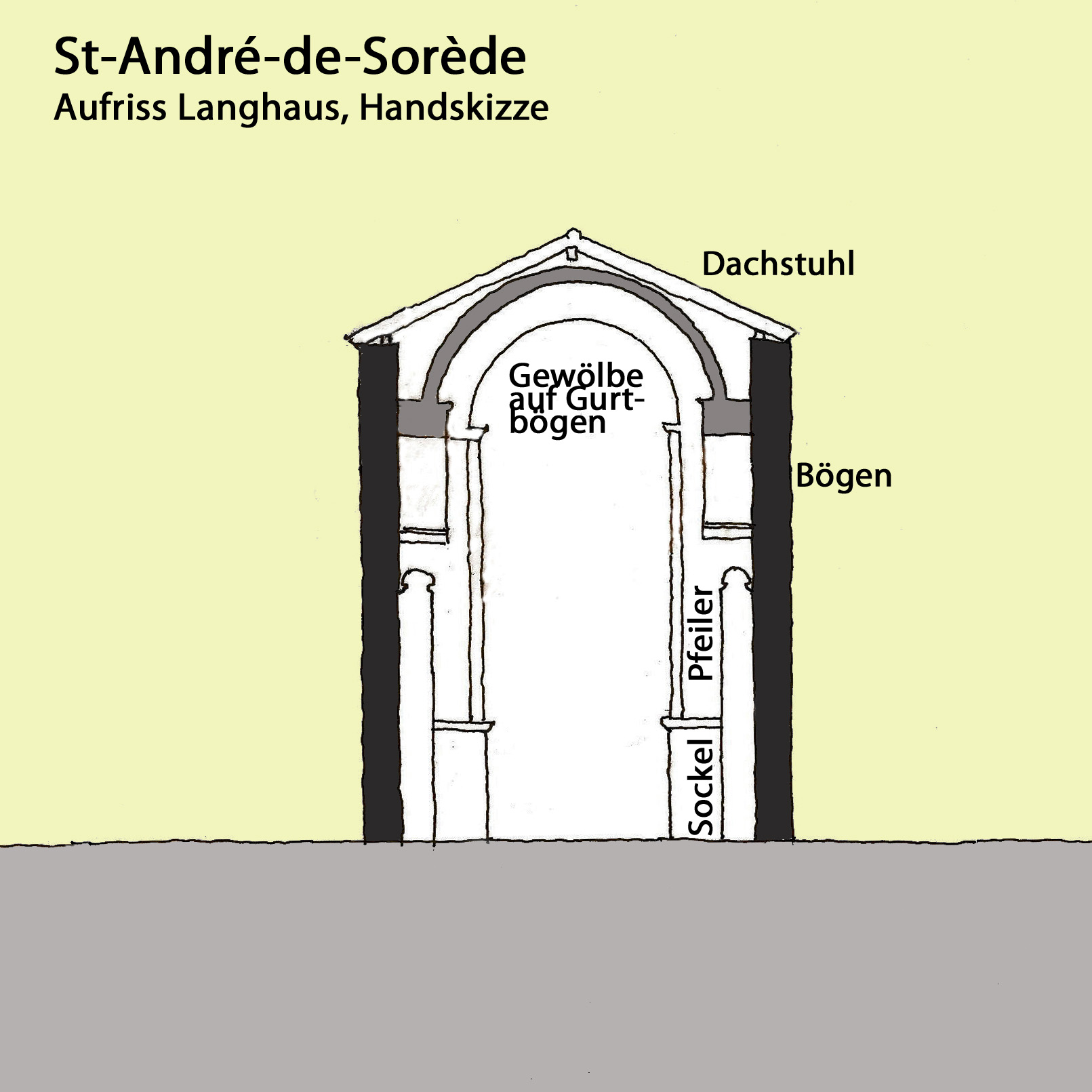 St-Adré-de-Sorède, Aufriss, Handskizze